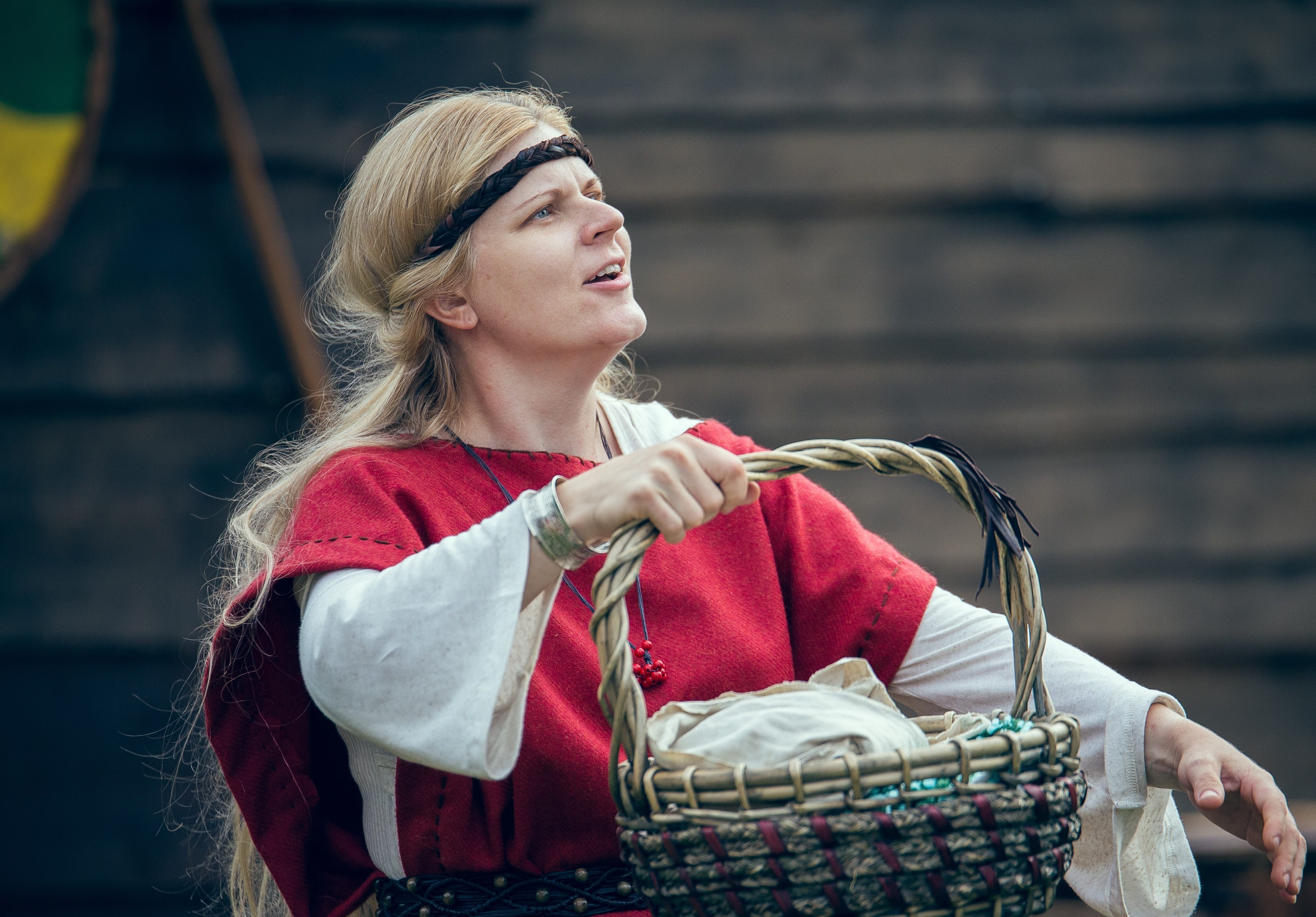 Etendus "Viikingitütar Ragna"